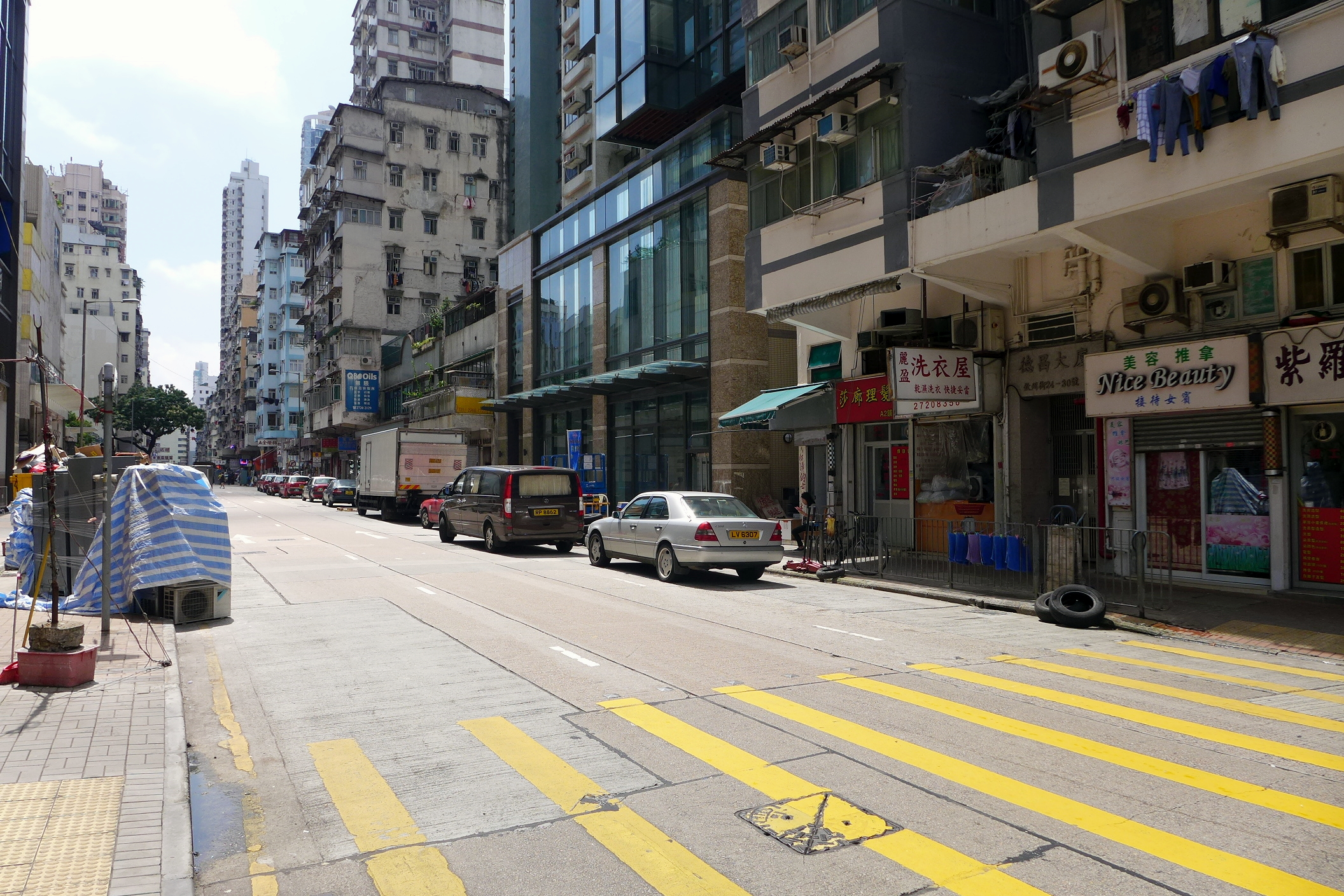 Yee Kuk Street